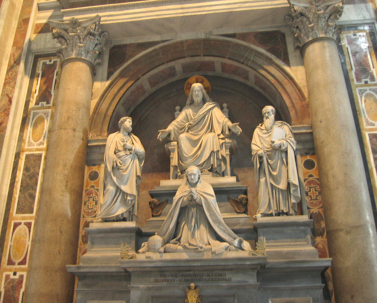 Pietro Tenerani – Monument to Pope Pius VIII (1853-1866) Basilica di San Pietro